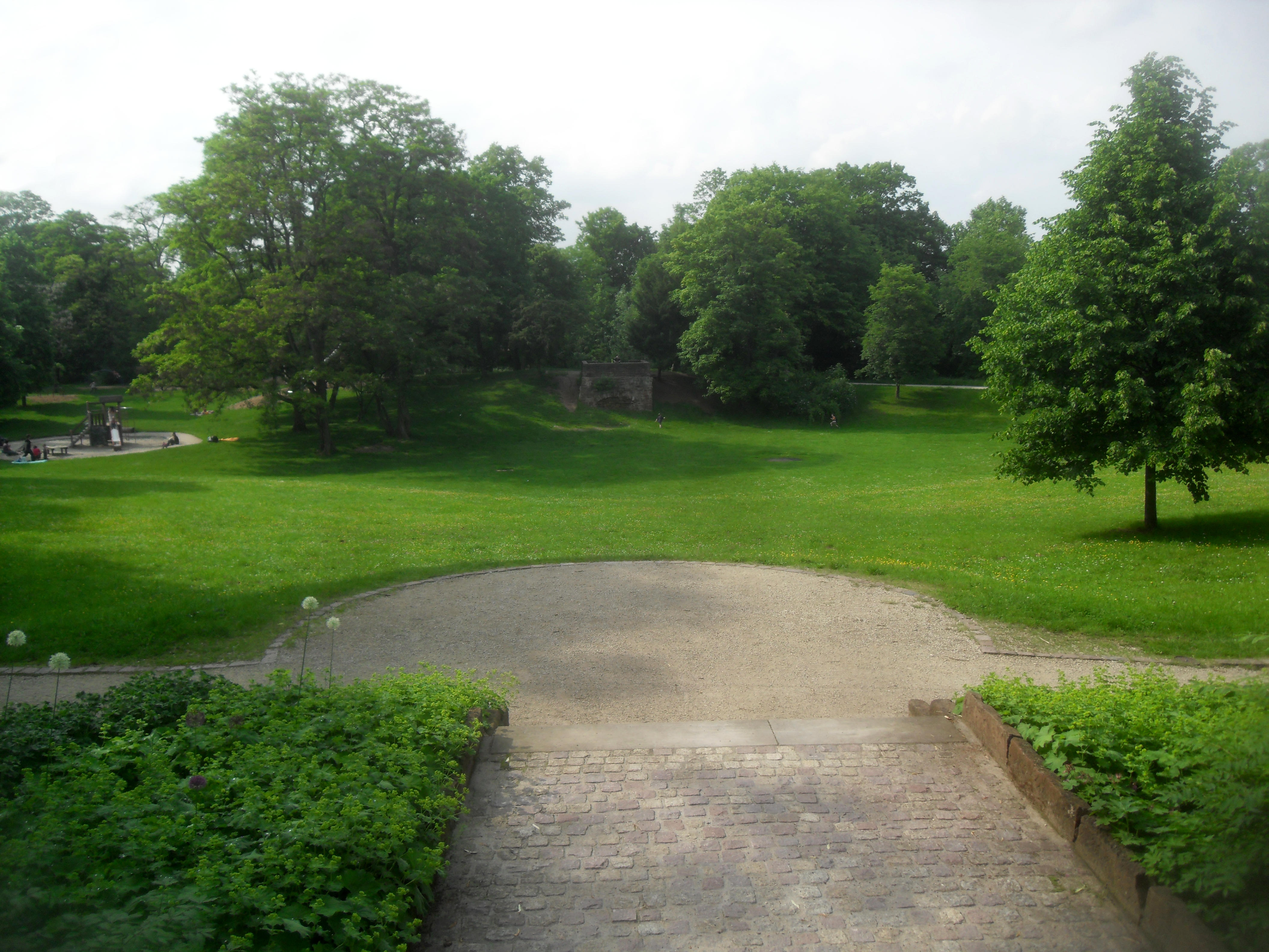 Der Wormser Karl-Bittel-Park in Rheinhessen in Rheinland-Pfalz (Deutschland)